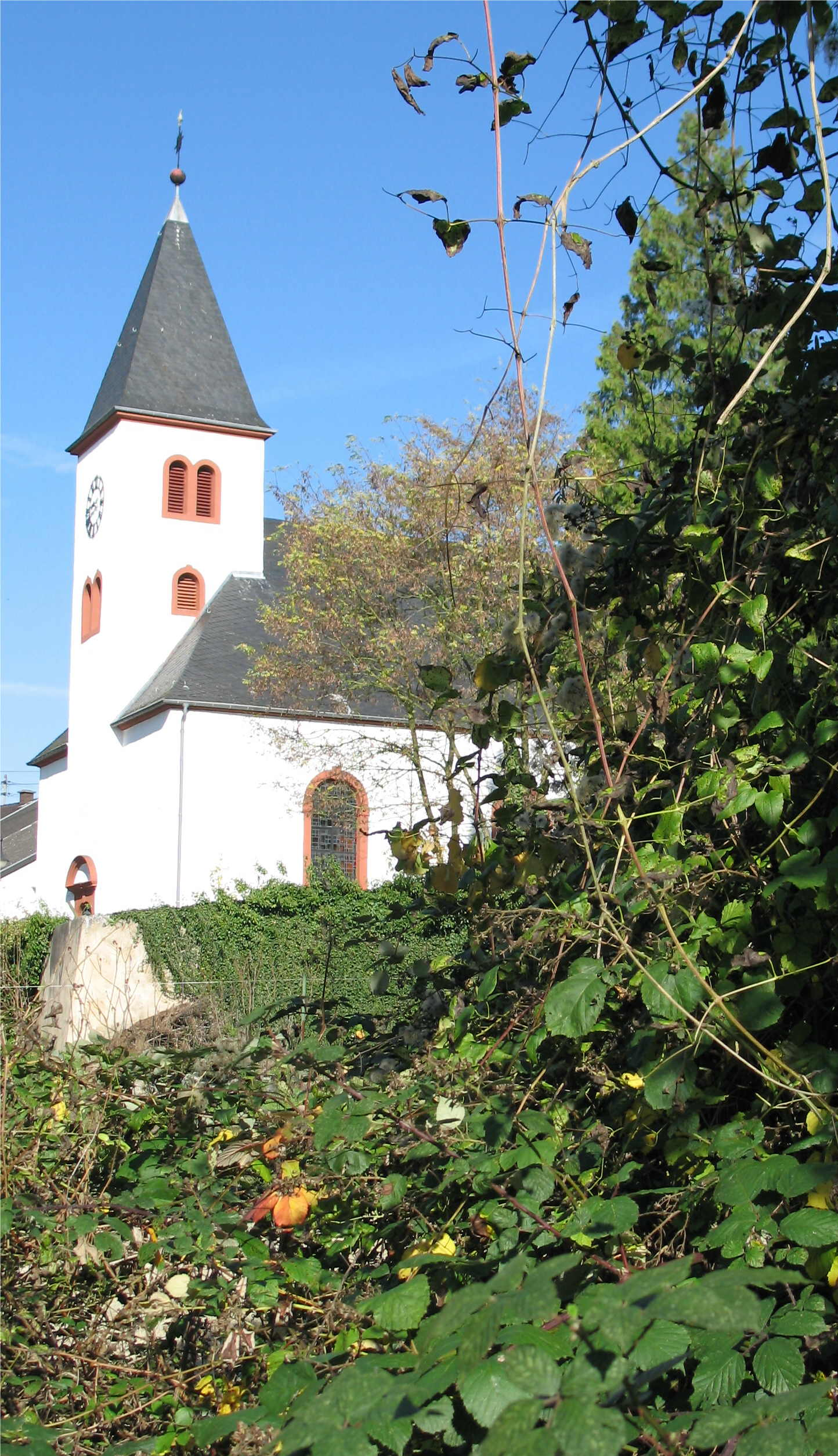 Kierchtuerm vu Nennig